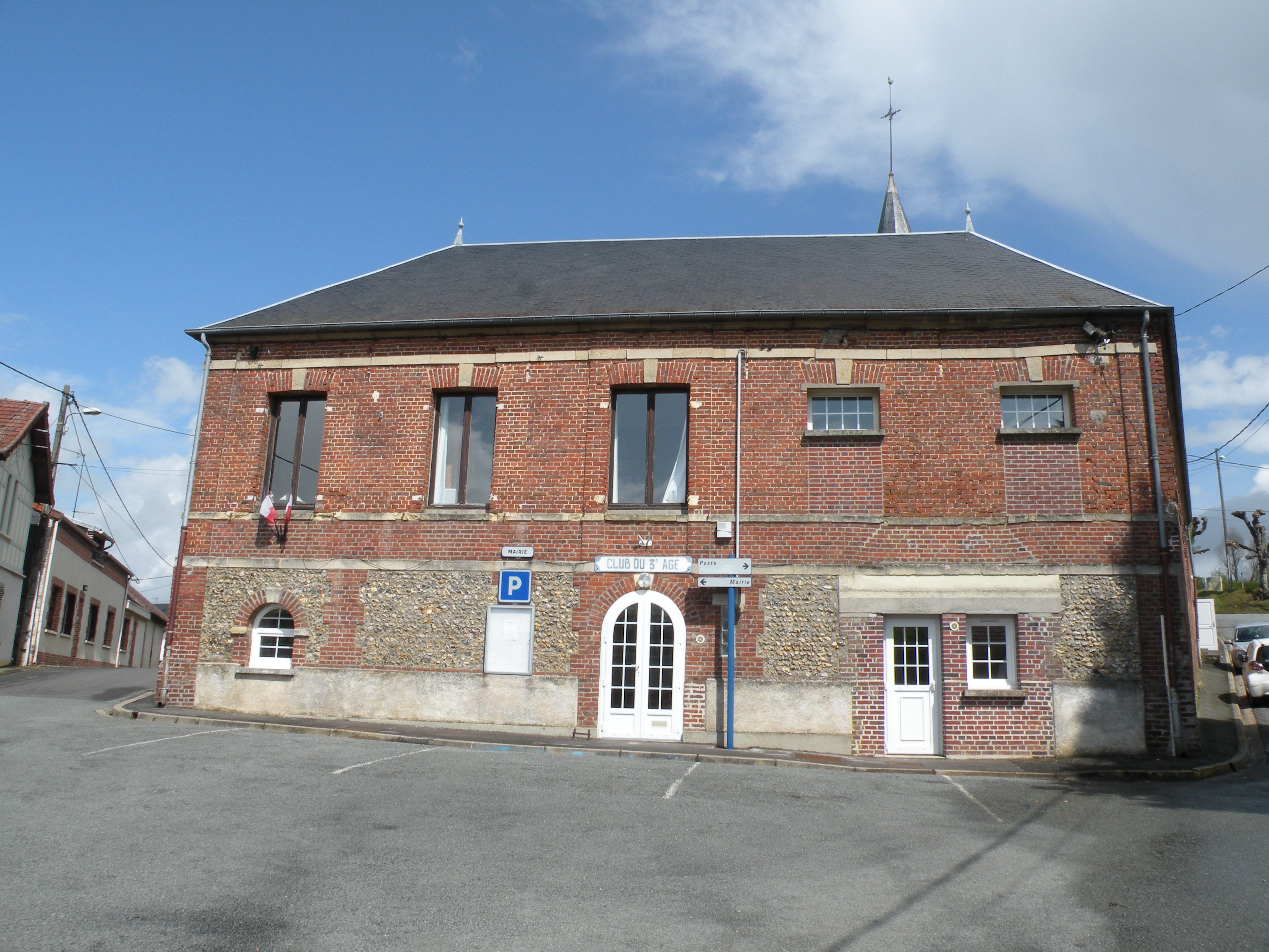 mairie de Valdampierre